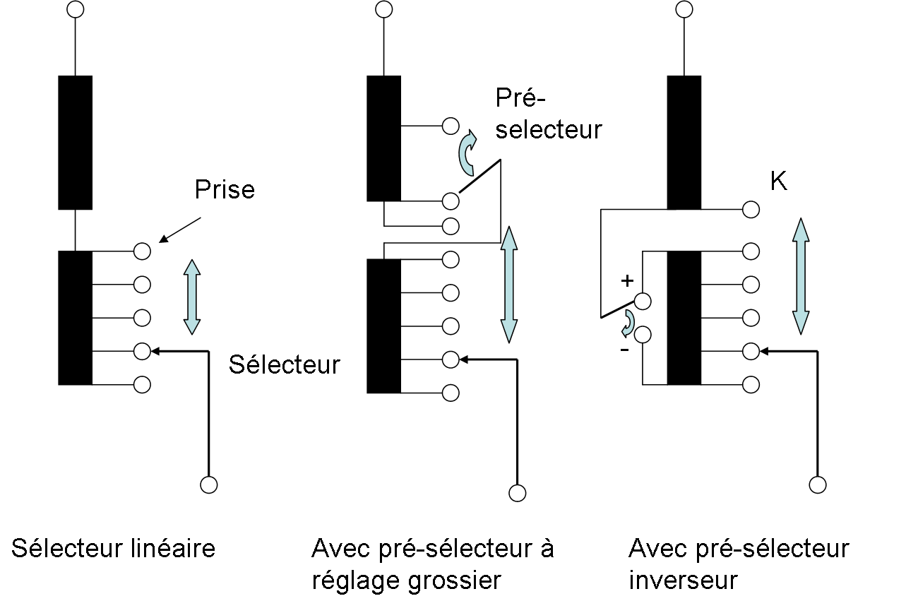 Les différents type de sélecteur et pré-sélecteur pour changeurs de prise.